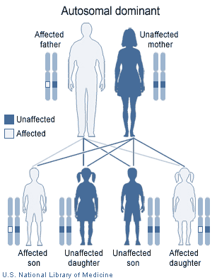 Patrón de herencia autosómica dominante. Fuente